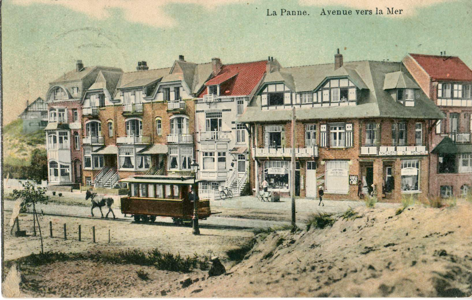 Carte postale ancienne éditée par Au petit Bonheur : LA PANNE - Avenue de la Mer